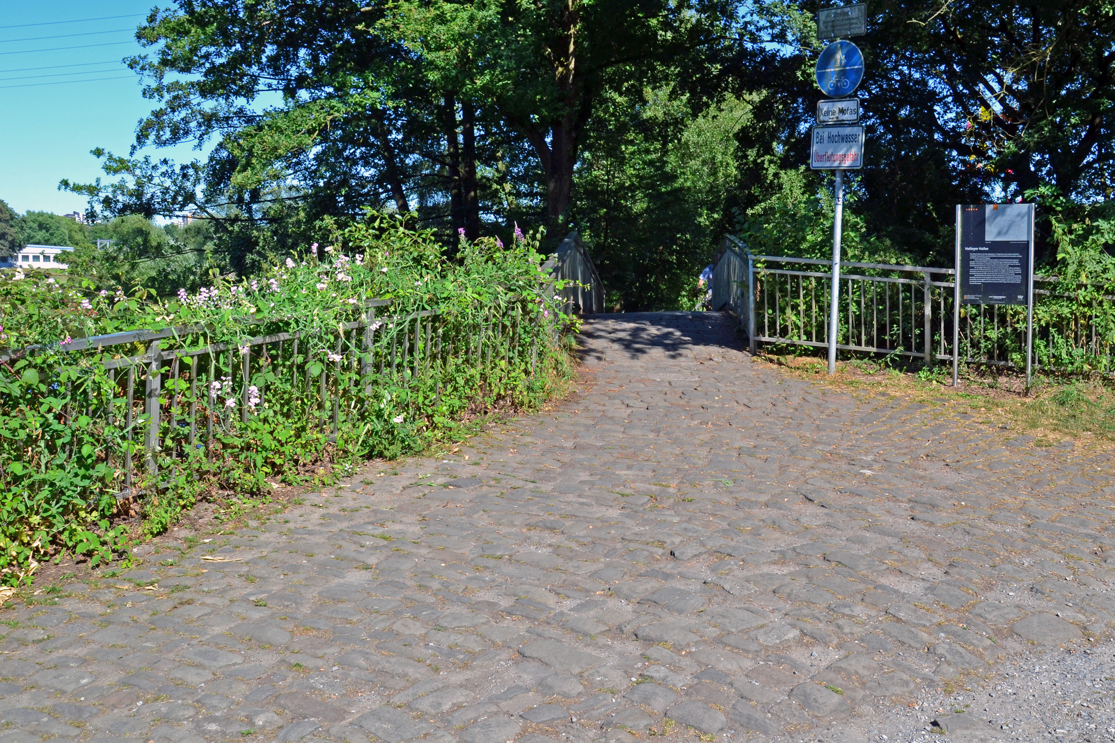 Brücke am Hafen Holtey an der Ruhr in Essen, mit originalem Pflaster des ehemaligen Treidelpfades